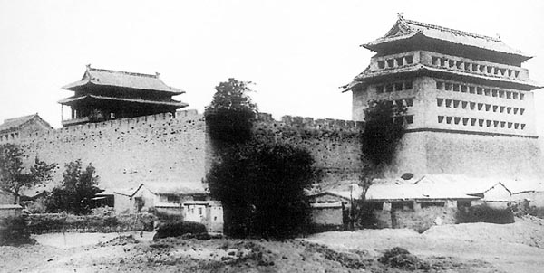 中文（中国大陆）: 北京东直门城楼及箭楼